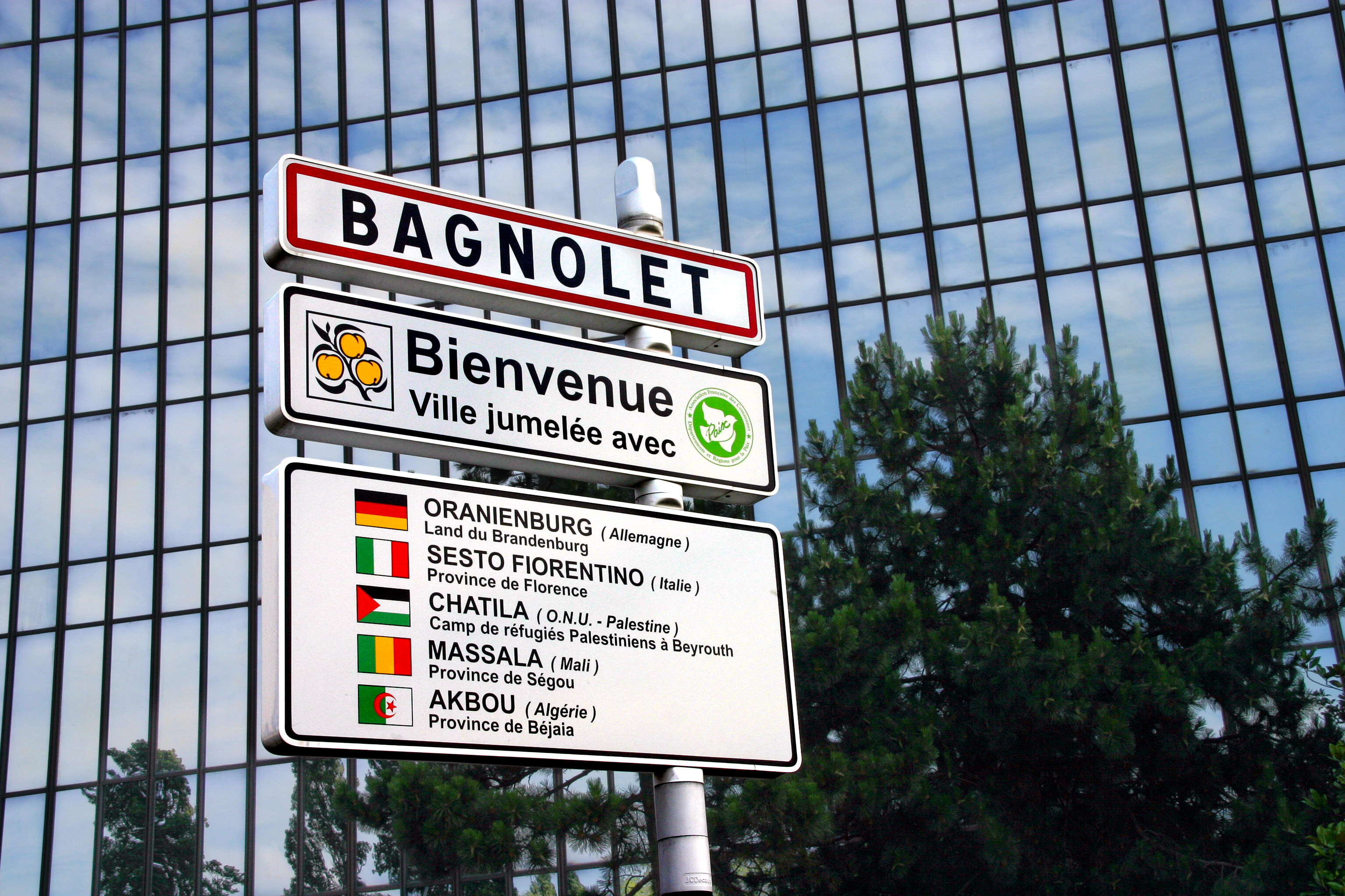 Panneau de localité indiquant le jumelage de Bagnolet avec Oranienburg, Sesto Fiorentino, Chatila, Massala, Akbou